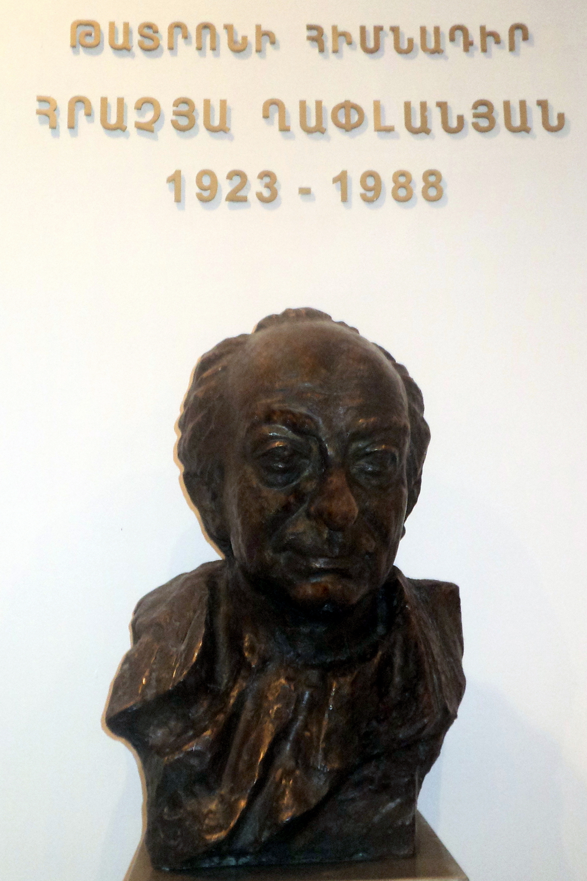 Հրաչյա Ղափլանյանի դիմաքանդակը դրամատիկական թատրոնի նախասրահում